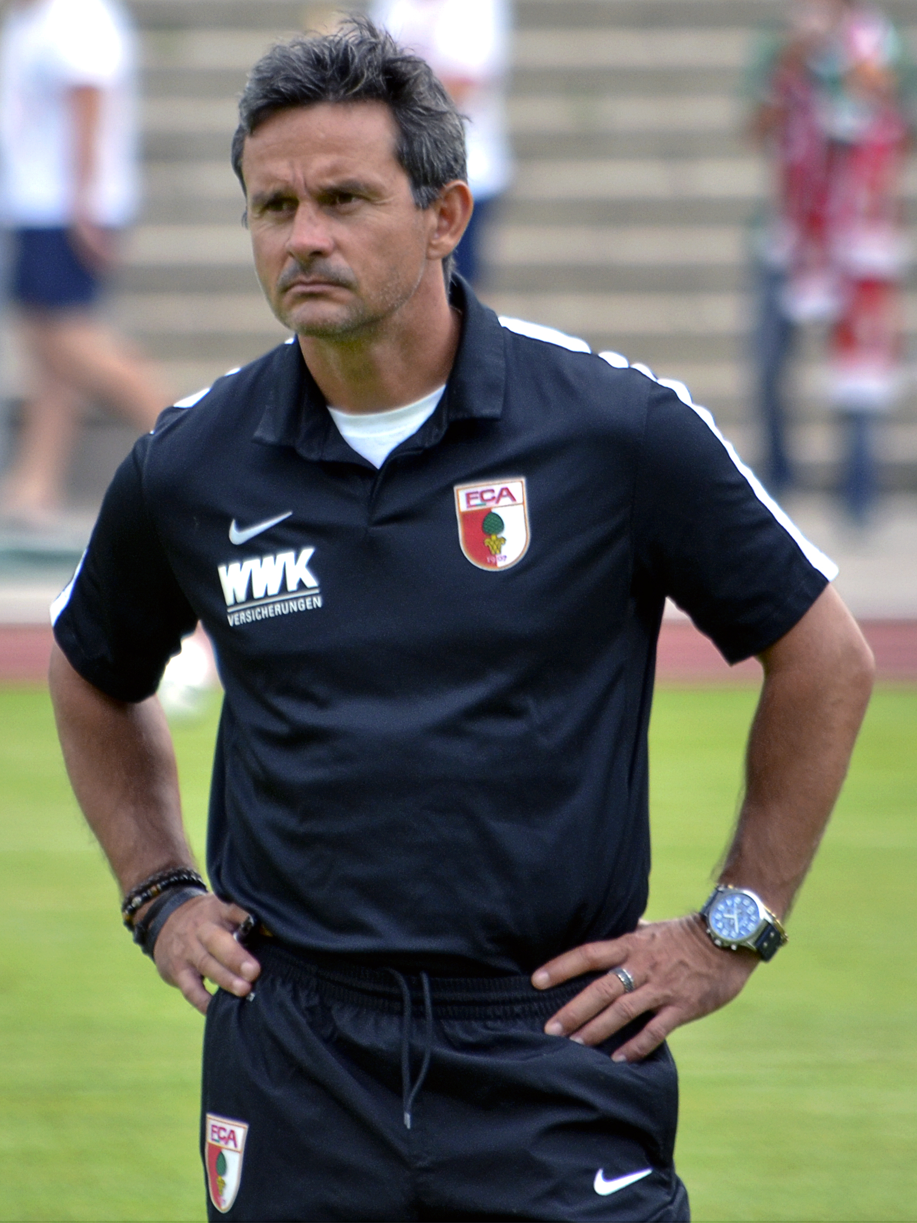 Dirk Schuster, Trainer des FC Augsburg 2016